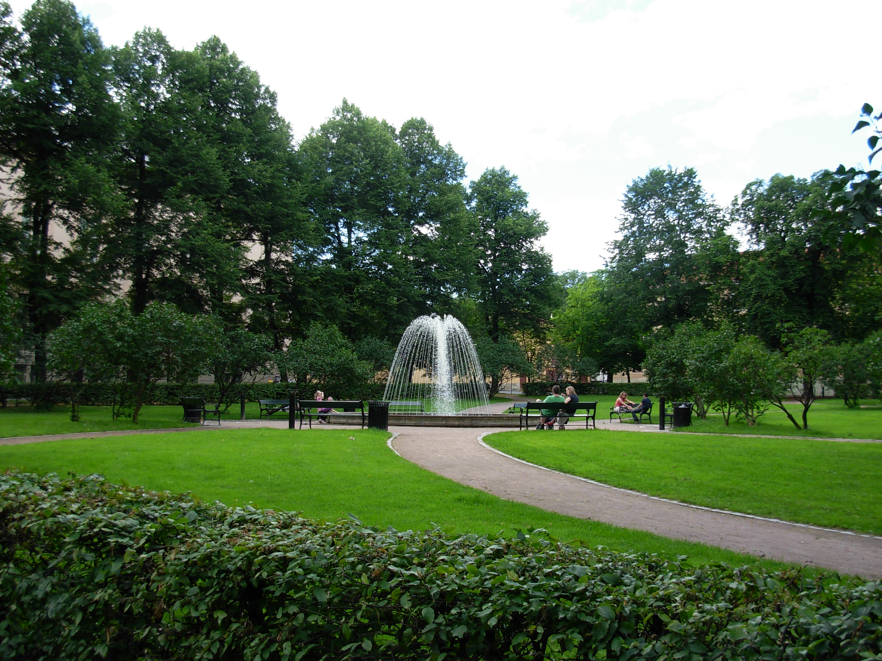 Grev Wedels plass, Kvsdraturen, Oslo